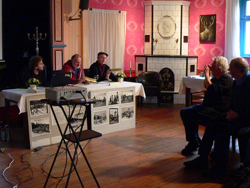 Ausgrabung der Republik Freies Wendland, Pressetermin mit Vorstellung der Ausgrabung vom Oktober 2017, links der Archäologe Attila Dézsi